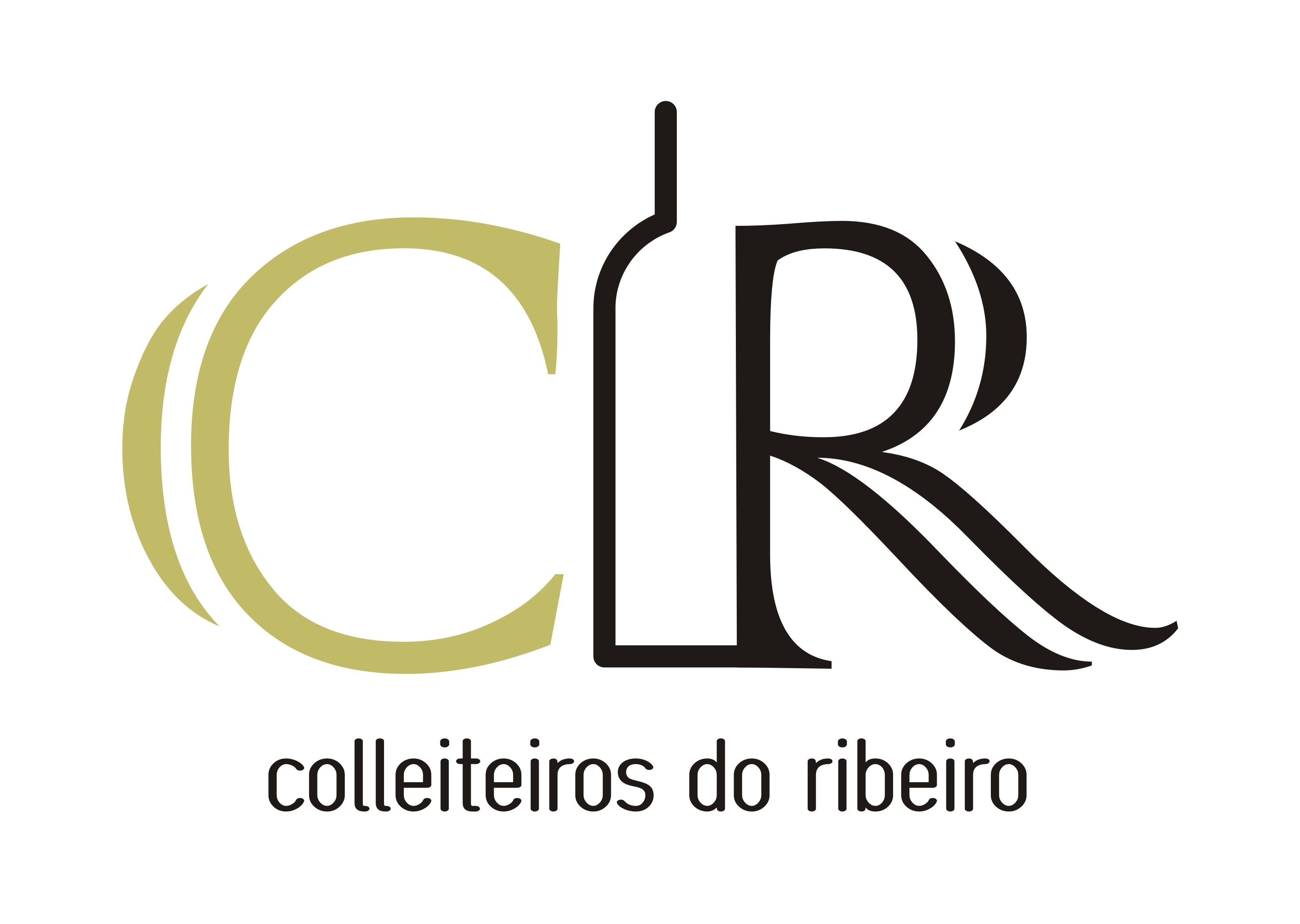 Logo de la Asoicacion de Colleiteiros Embotellaores do Ribeiro